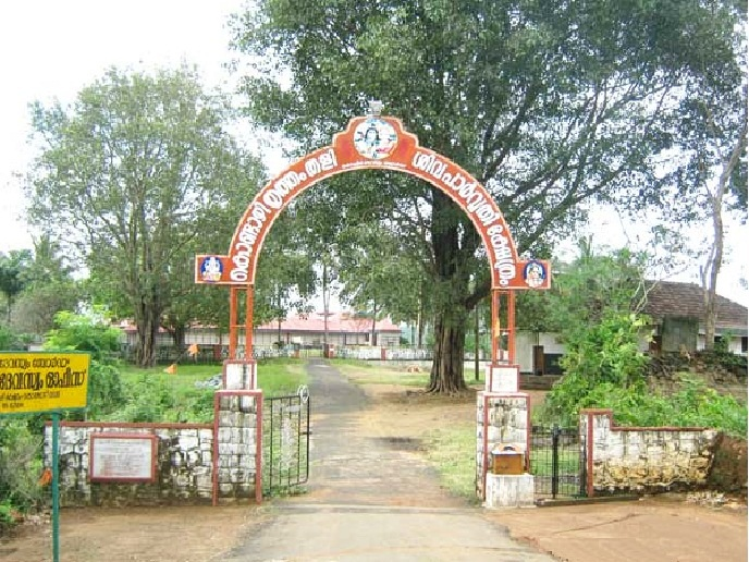 പഴയന്നൂർ കൊണ്ടാഴി തൃതംതളിക്ഷേത്രം-കവാടം